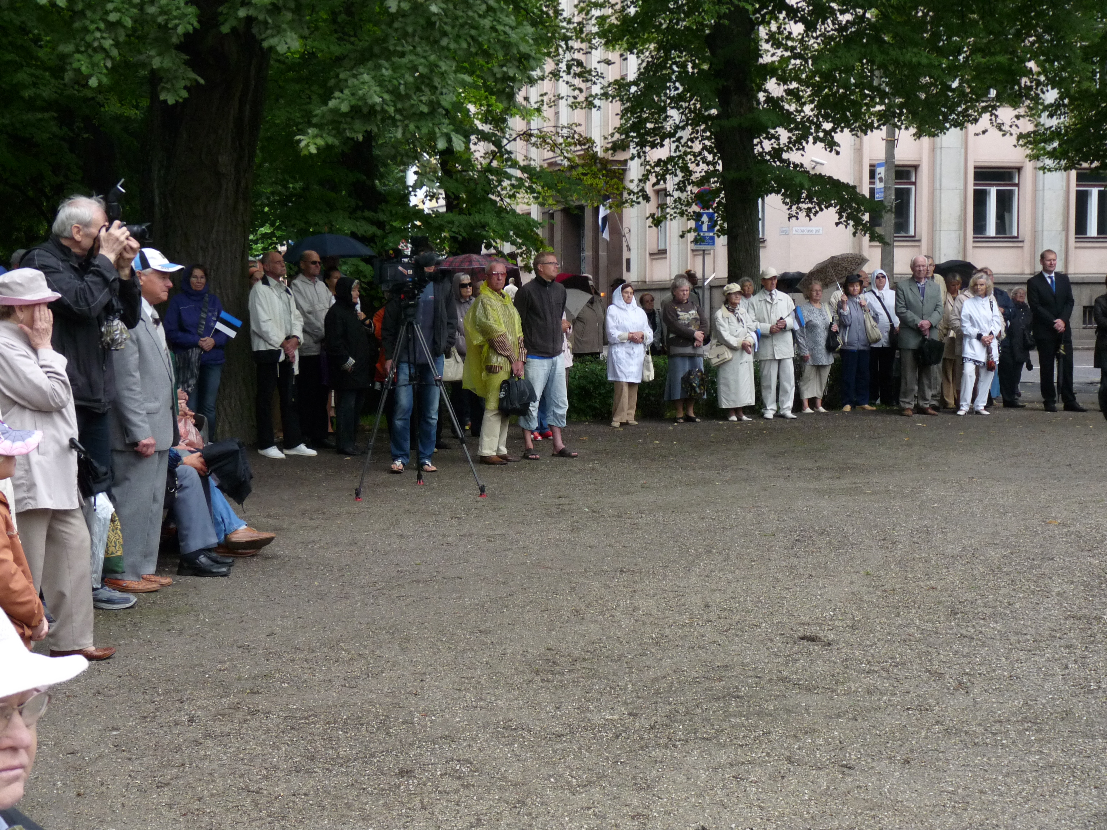 Pealtvaatajad Eesti taasiseseisvumispäeva tähistamisel Tartu vabadussamba juures, 20. august 2012